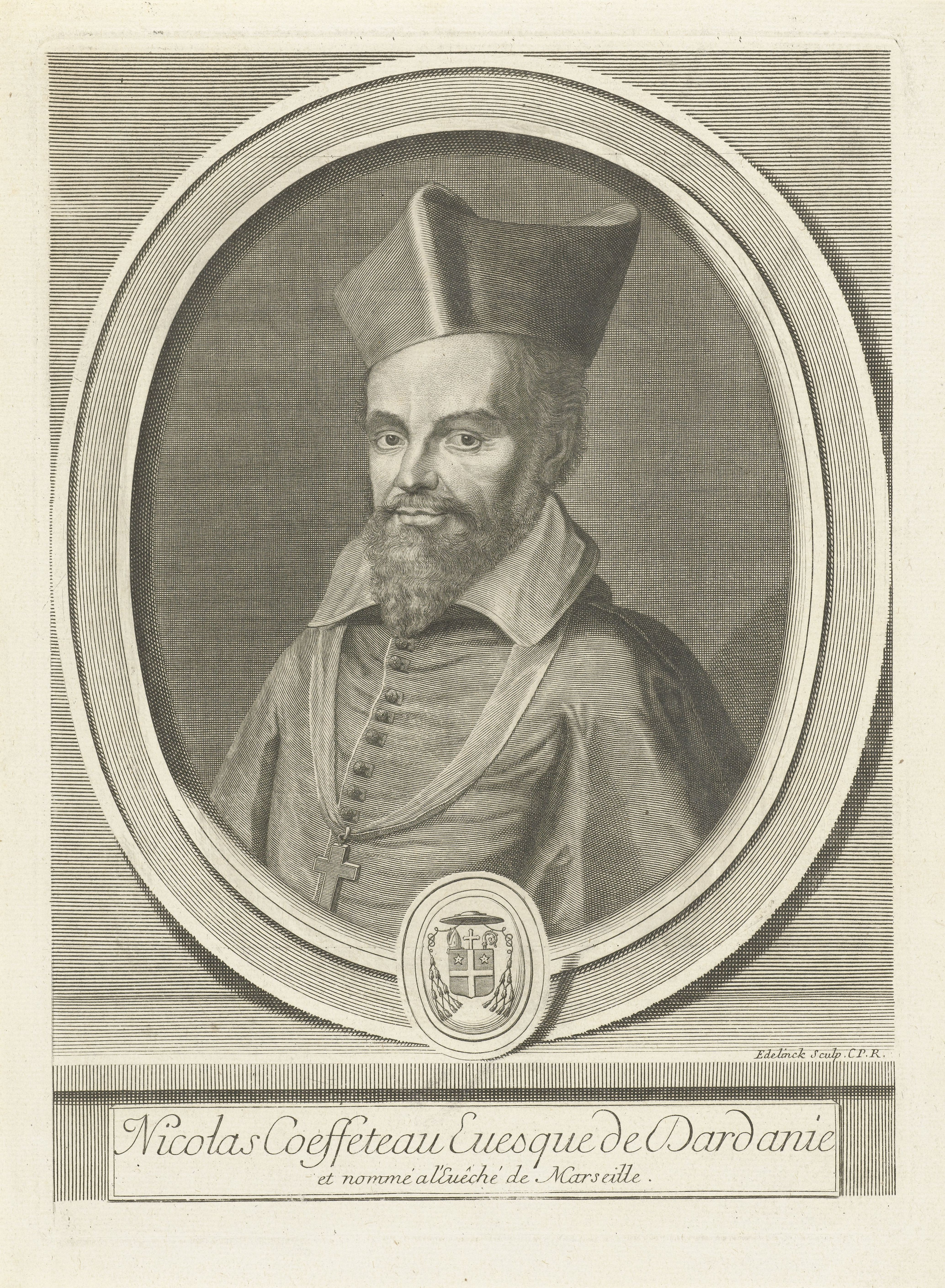 IdentificatieTitel(s): Portret van Nicolas CoeffeteauObjecttype: prent Objectnummer: RP-P-1906-2645Catalogusreferentie: Robert-Dumesnil 169Opschriften / Merken: verzamelaarsmerk, gestempeld (vals): Lugt 2228Omschrijving: Busteportret van bisschop Nicolas Coeffeteau (1574-1623), afgebeeld in ovale lijst met wapen.VervaardigingVervaardiger: prentmaker: Gerard Edelinck (vermeld op object)verlener van privilege: Lodewijk XIV (koning van Frankrijk) (vermeld op object)Plaats vervaardiging: prentmaker: Parijsverlener van privilege: FrankrijkDatering: 1666 - 1707Fysieke kenmerken: gravureMateriaal: papier Techniek: graveren (drukprocedé)Afmetingen: plaatrand: h 259 mm × b 188 mmOnderwerpWie: Nicolas CoeffeteauVerwerving en rechtenVerwerving: aankoop 1906Copyright: Publiek domein